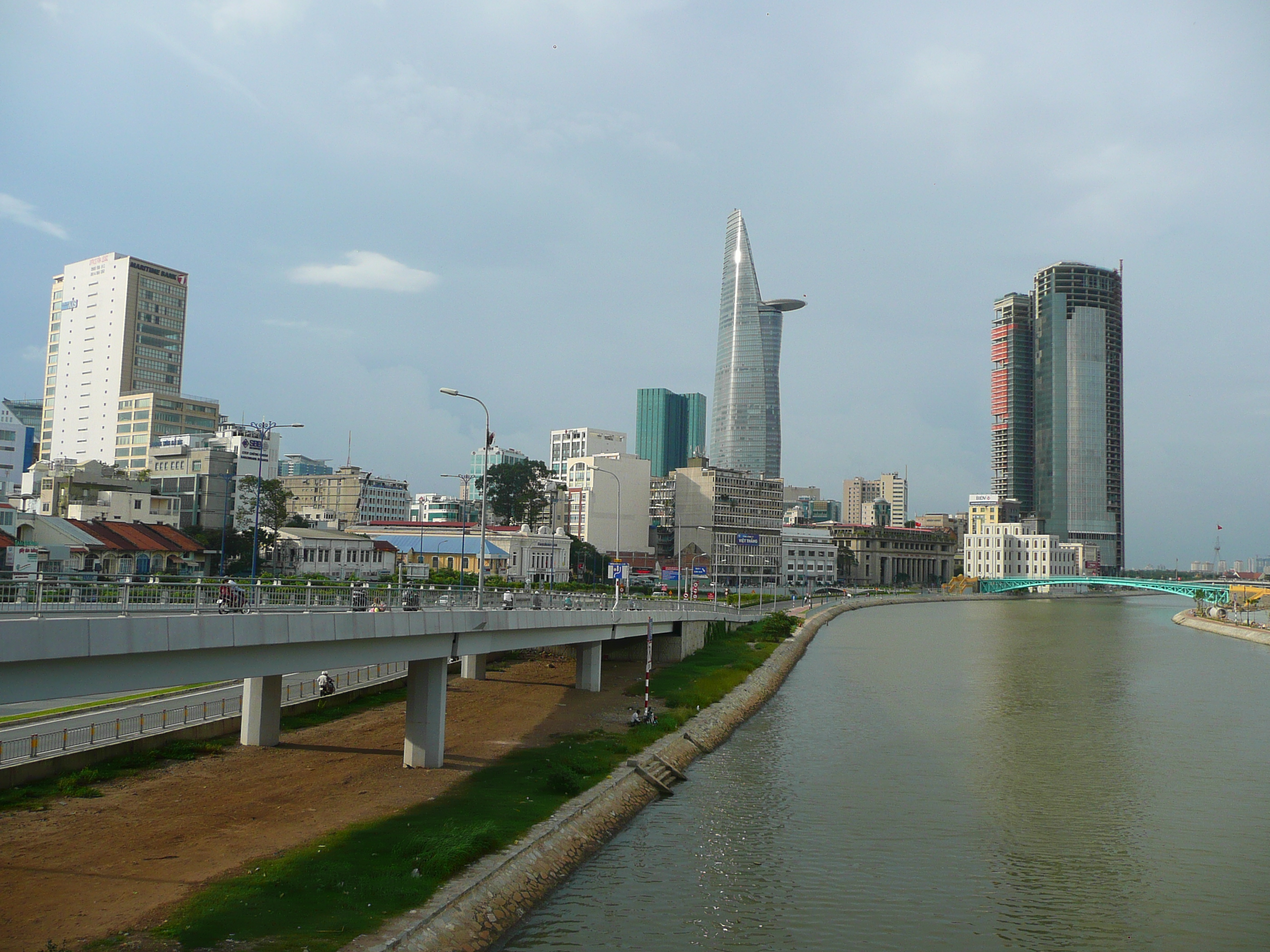 Một phần Cầu Calmette